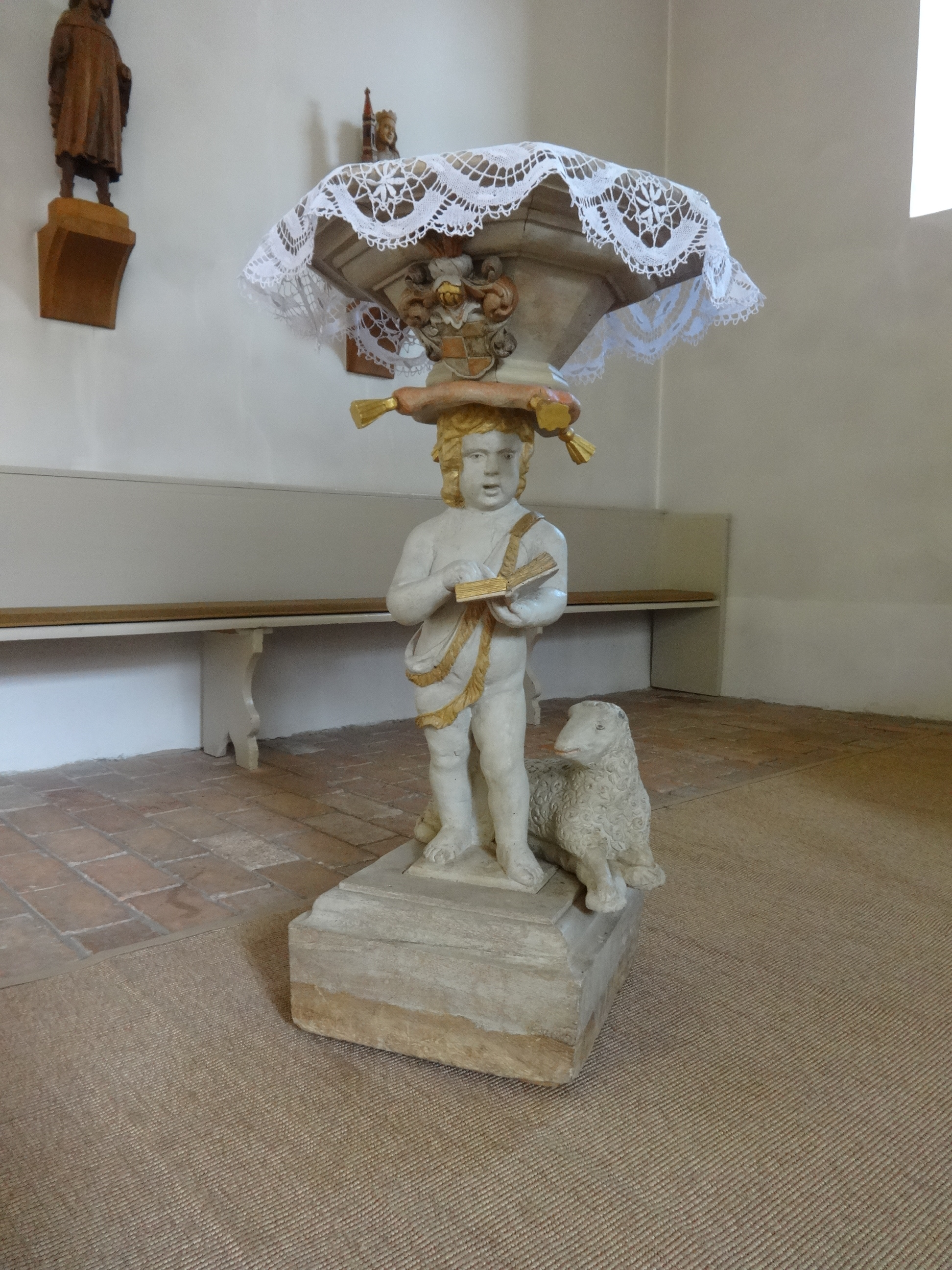 Die evangelische Kirche stammt vermutlich aus dem 14. oder 15. Jahrhundert. Sie ist aus auffällig ungleichmäßigen behauenen Feldsteinen gebaut und damit eine Besonderheit unter den Kirchen im Teltow. Im Innern befindet sich eine gotische Marienfigur aus dem 14. Jahrhundert